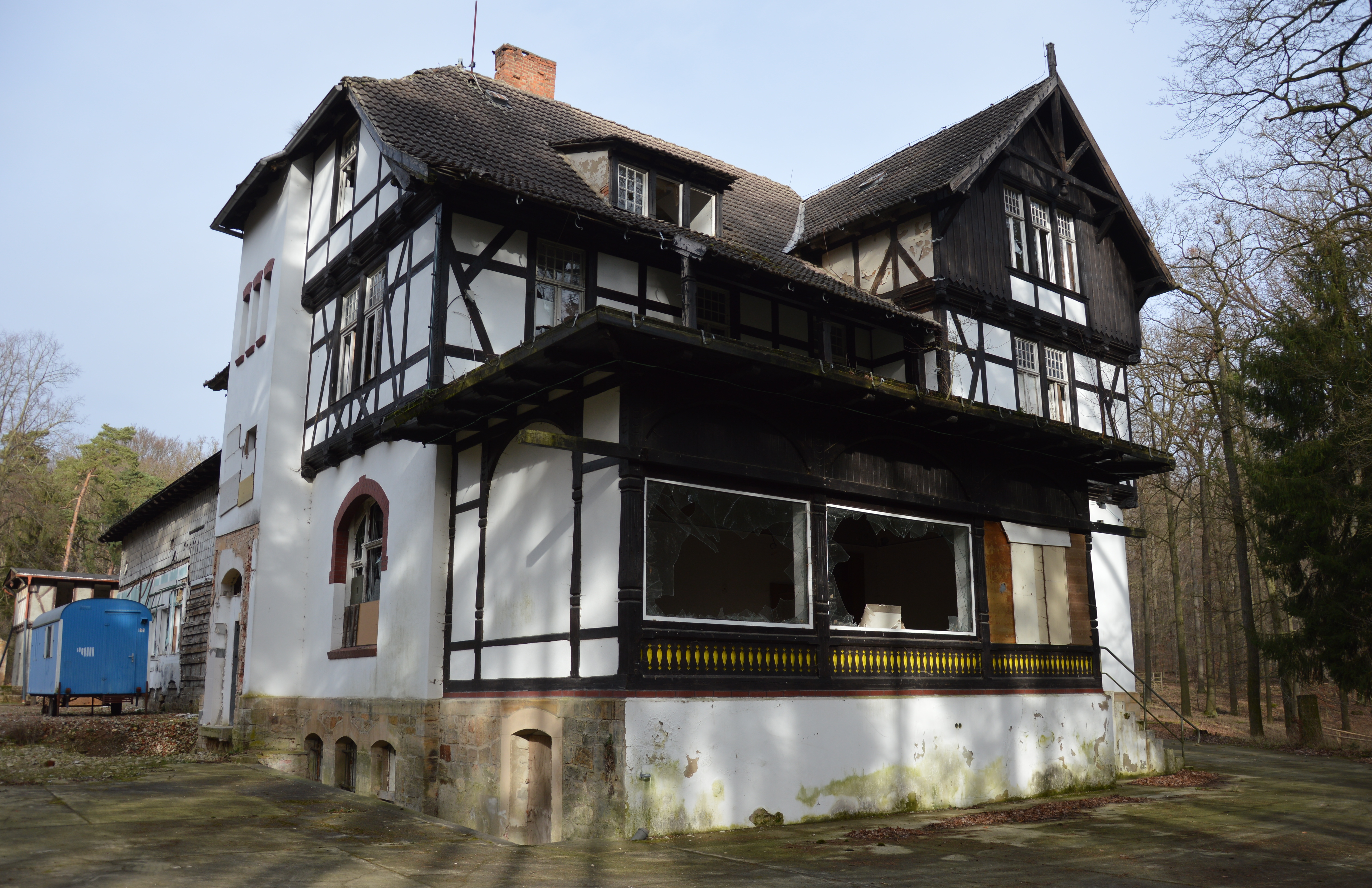 Hubertushöhe